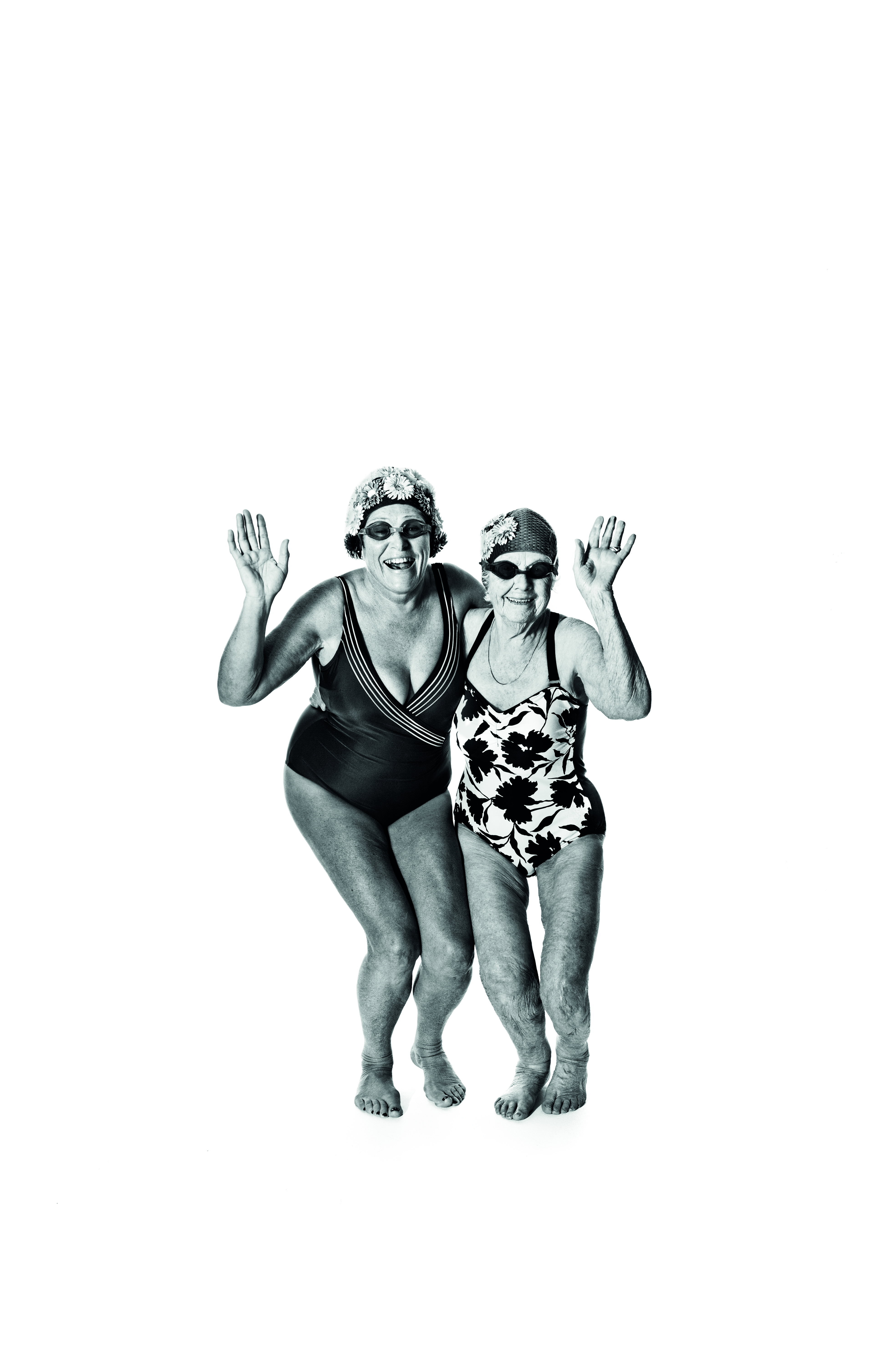 LFEs motto er lev livet - livet ut!